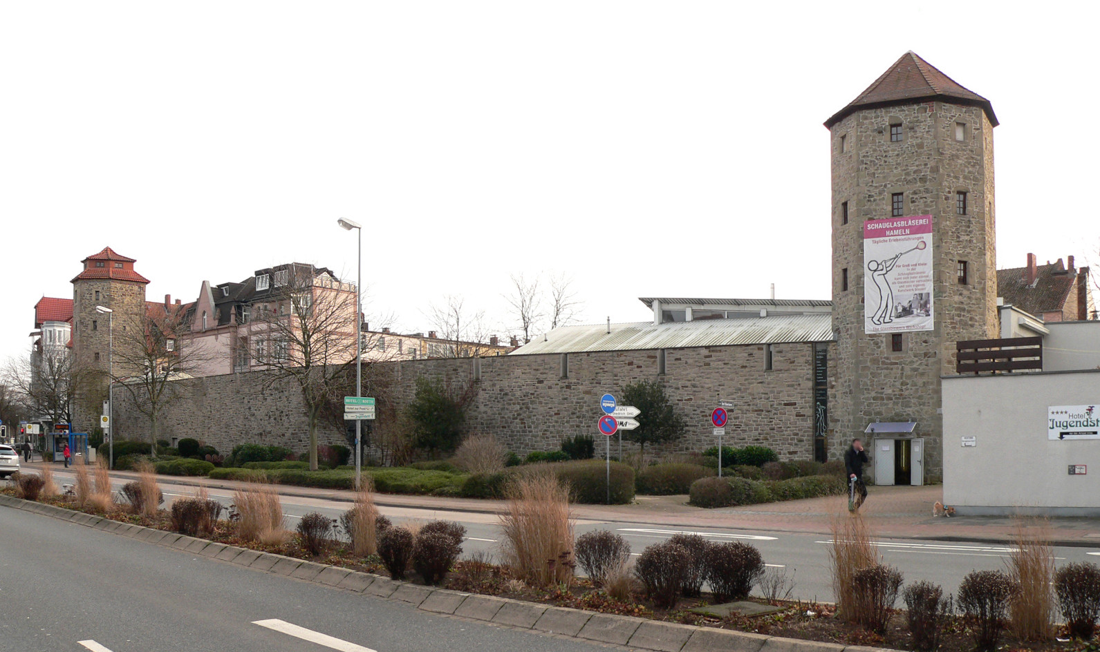 Stadtbefestigung Hameln mit rekonstruiertem Stadtmauerabscnitt zwischen Pulverturm und Haspelmathturm